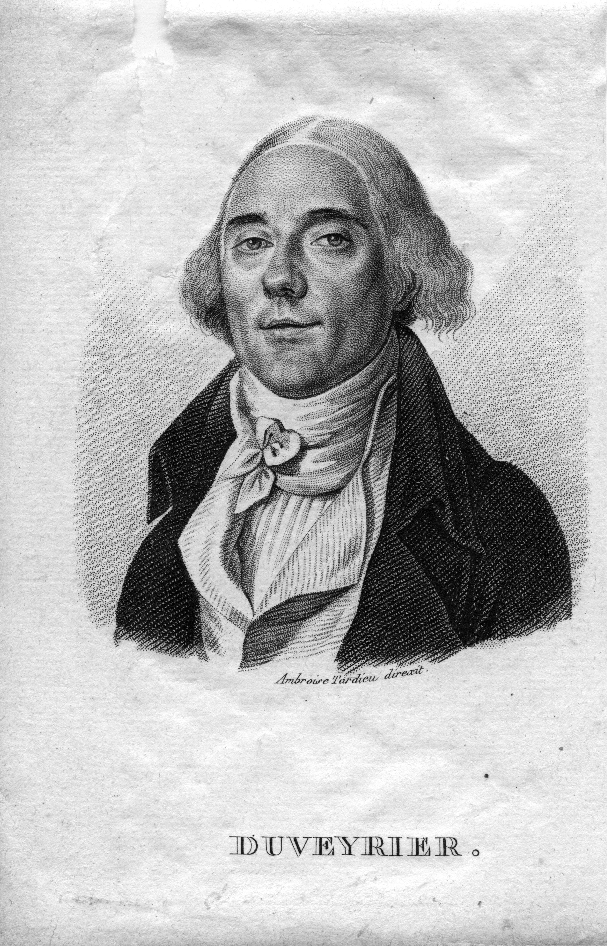 portrait gravé